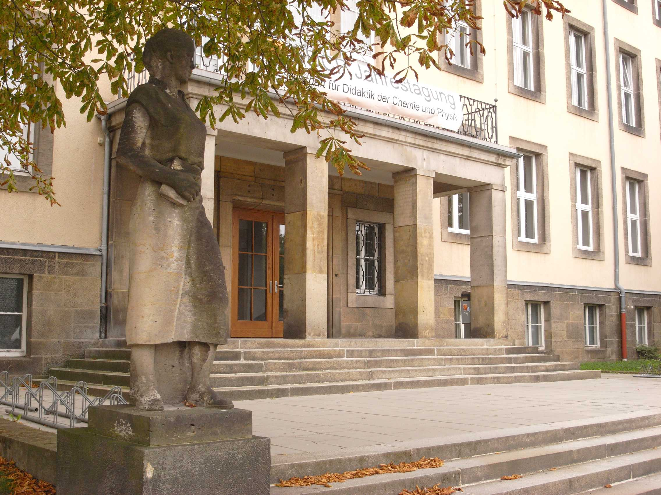 Technische Universität Dresden, Weberplatz 5, Eingang am ehemaligen Gebäude der Arbeiter- und Bauernfakultät (Sachsen, Deutschland) Sandsteinfigur ABF-Studentin von Gerhard Markwald